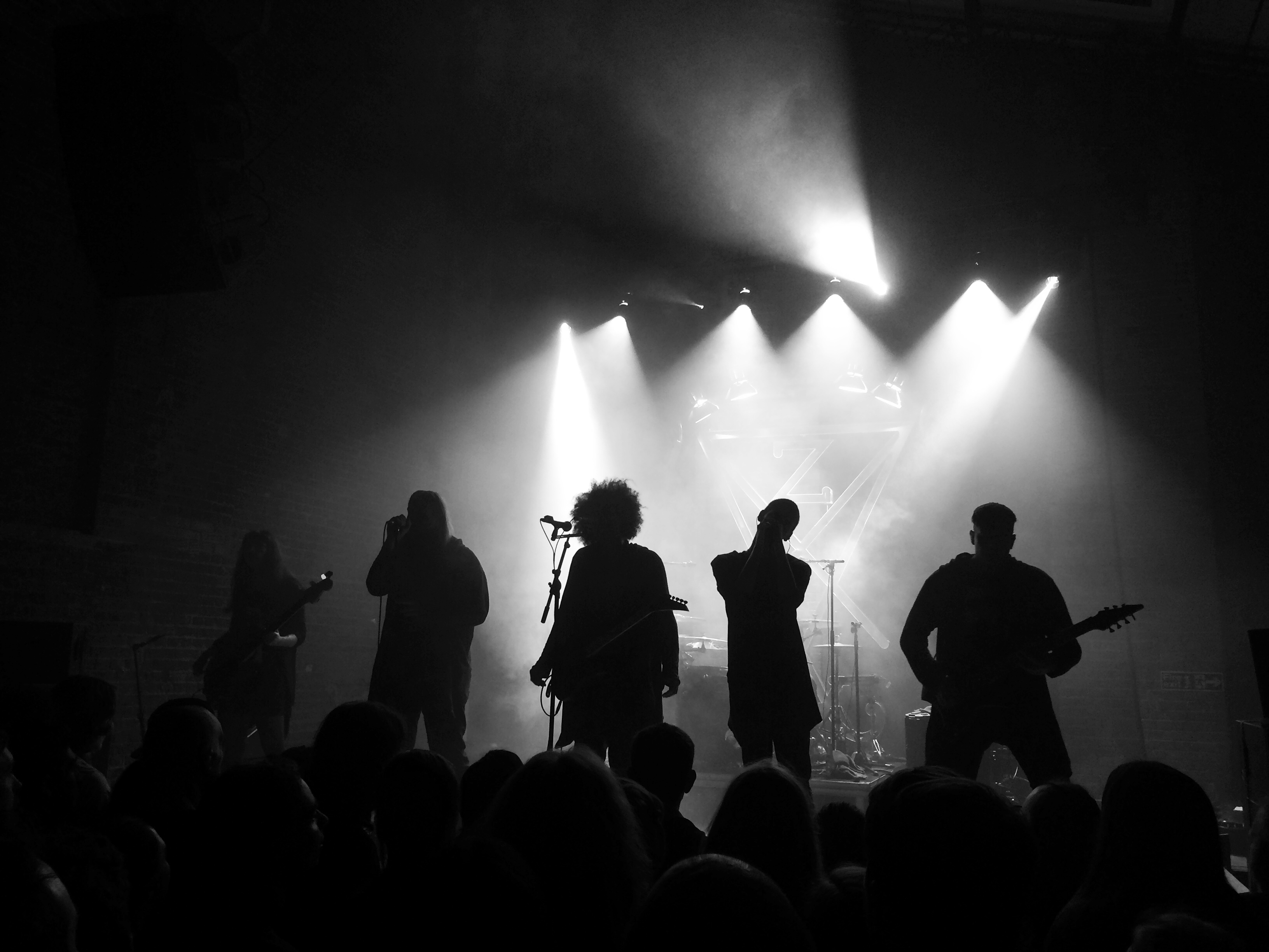 Zeal & Ardor June 4, 2018